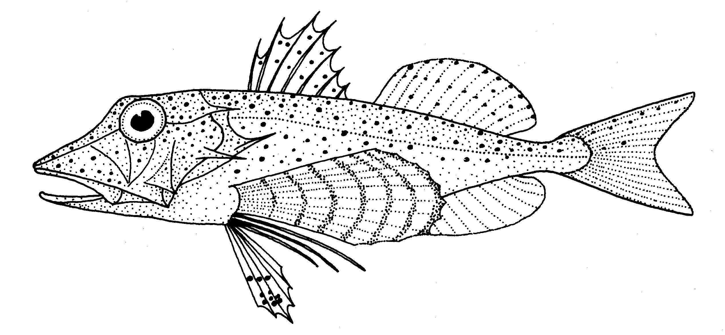 Pterygotrigla picta (spotted gurnard)